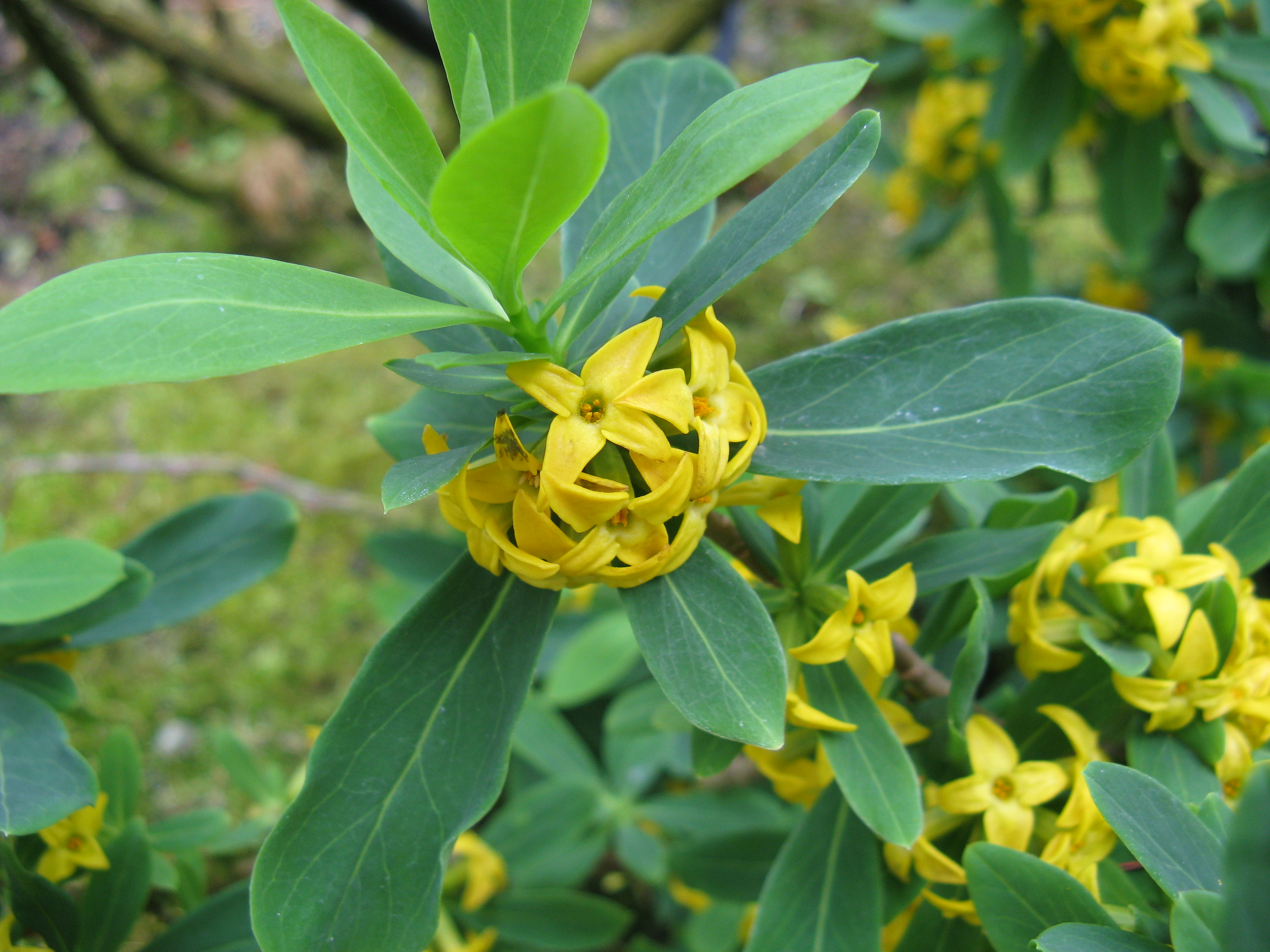 Scientific name Daphne pseudomezereum